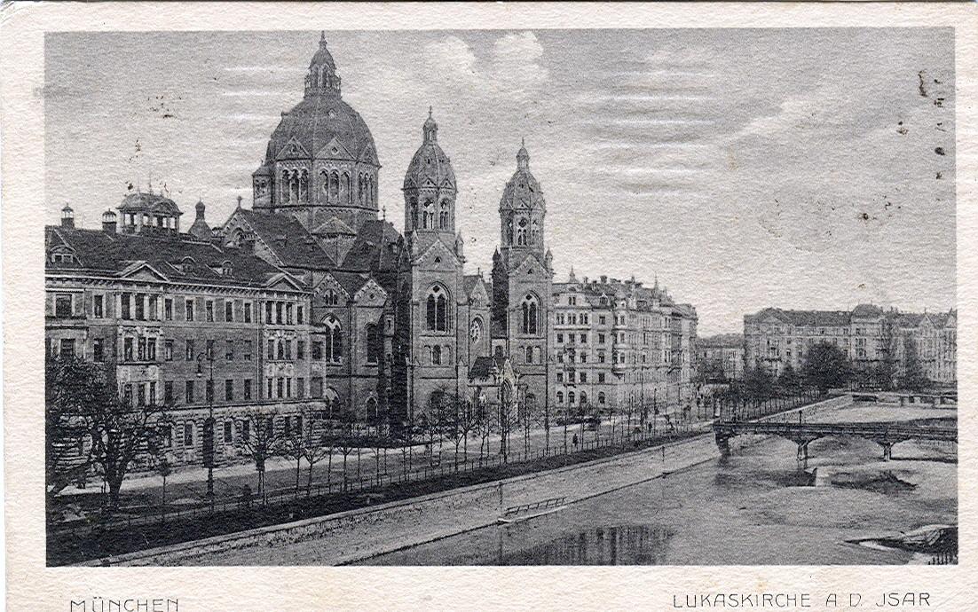 Postkarte, datiert 22.8.1918. Beschriftung: "München - Lukaskirche an der Isar."